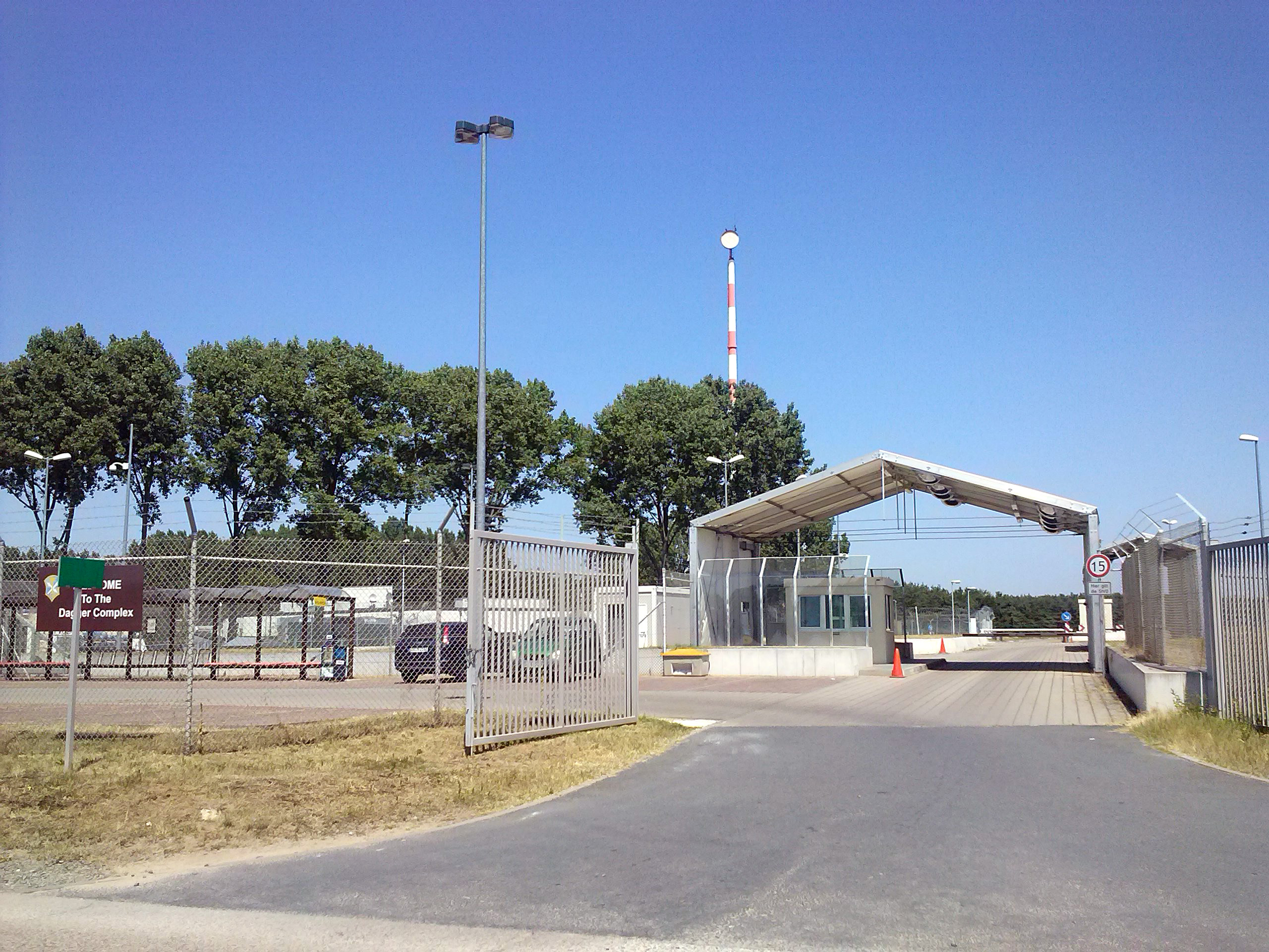 Die Einfahrt zum Dagger Complex südlich von Griesheim.